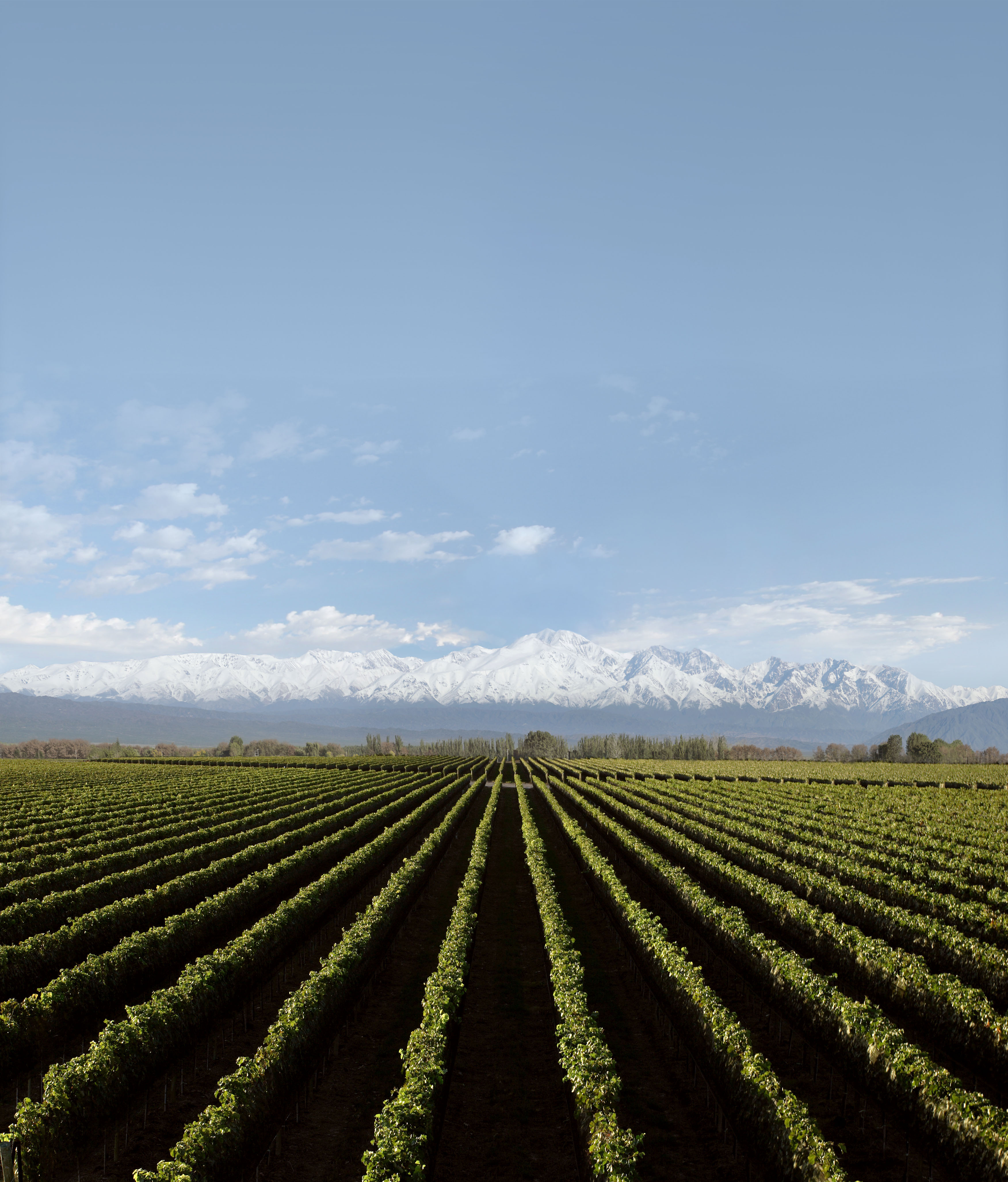 Plantacion de Bodega Chakana en Agrelo, Lujan de Cuyo, Mendoza.